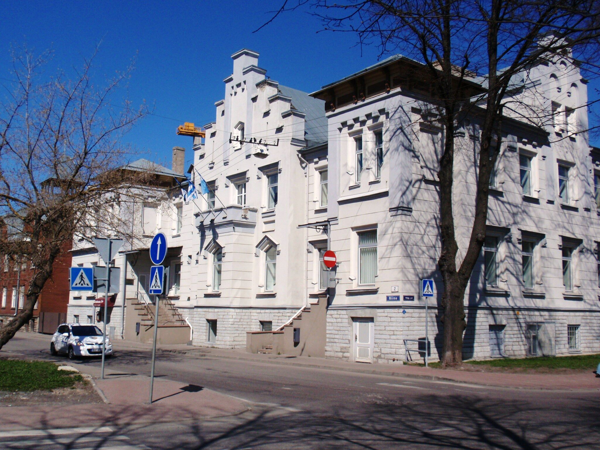 Põhja-Tallinna valitsus